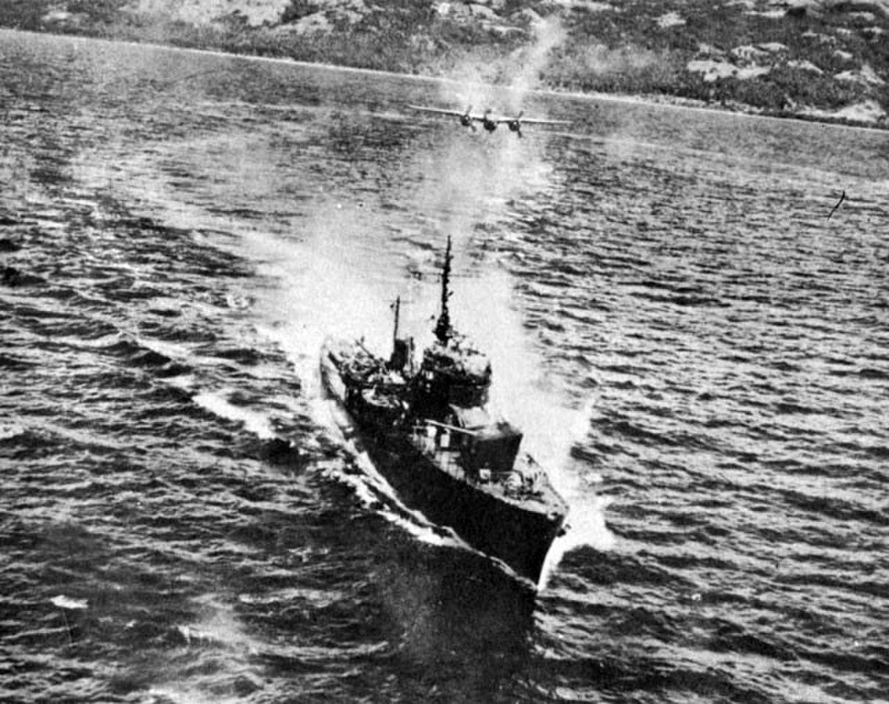 日本海軍第一号型海防艦『第十一号海防艦』、オルモック湾